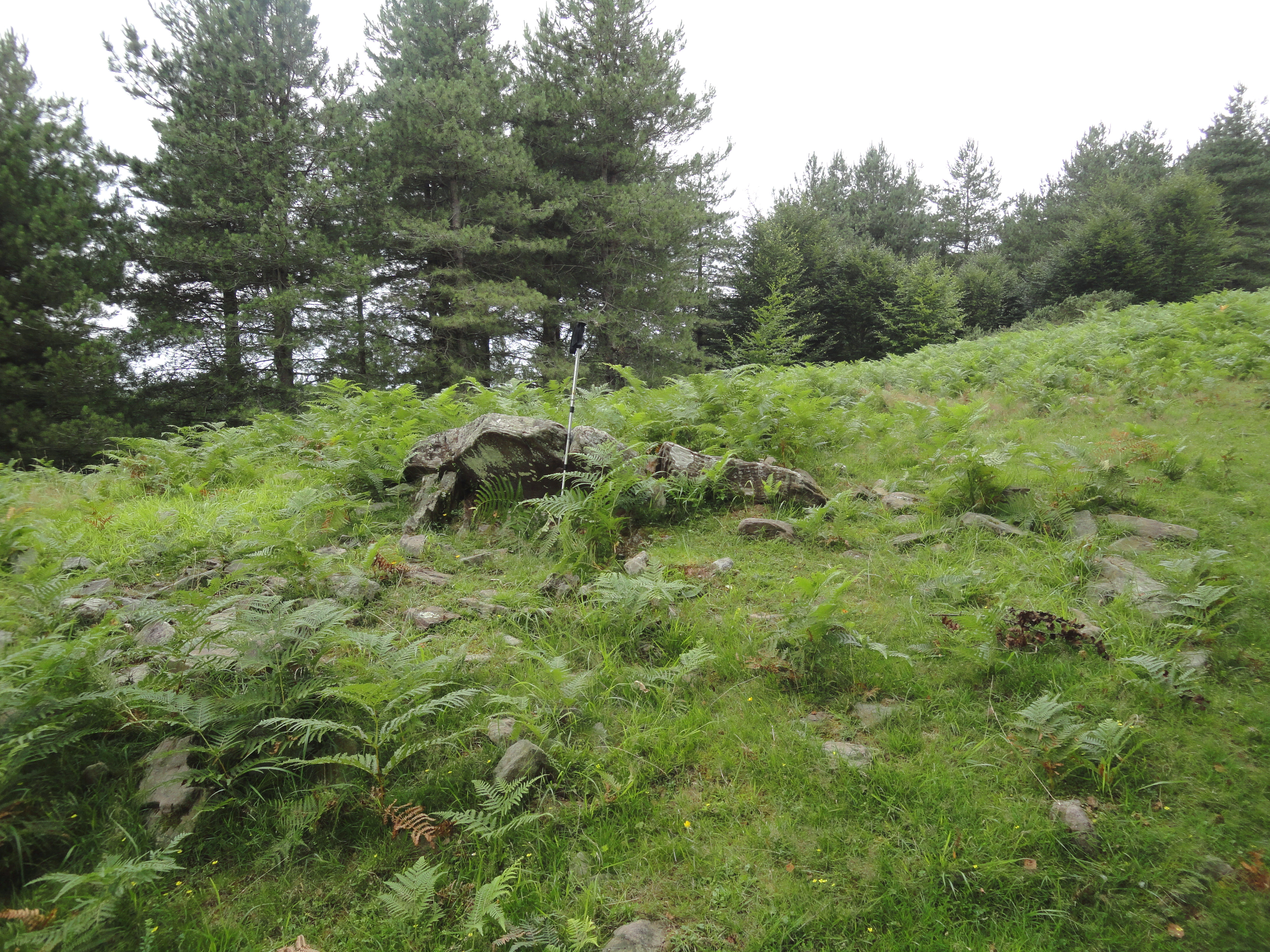 Akolako lepua II trikuharria